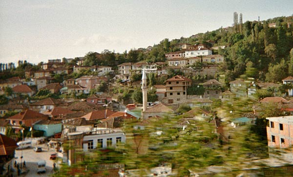 Beschreibung: Moschee, Ottomanische Häuser und Neubauten in Peshkopi oberhalb der Hauptstrasse. Quelle: selber fotografiert im September 2004. Fotograf: L. Haefner Lizenzstatus: GNU FDL